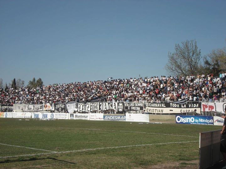 La hinchada de Gimnasia y Esgrima de Mendoza en 2008.